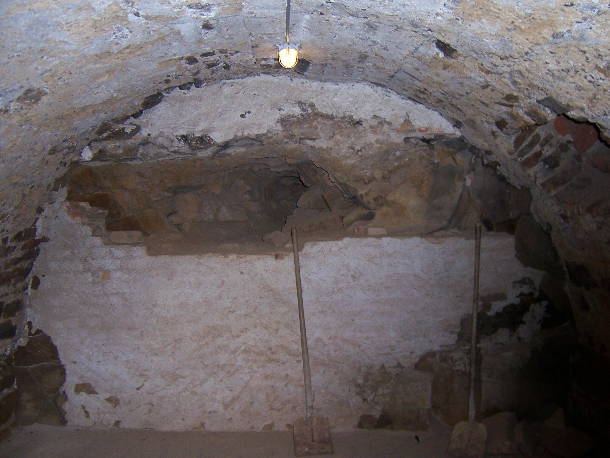 Beschreibung: Schloss Colditz (Sachsen), Anfang des Fluchttunnels im Weinkeller Quelle: eigene Aufnahme vom 8. April 2007